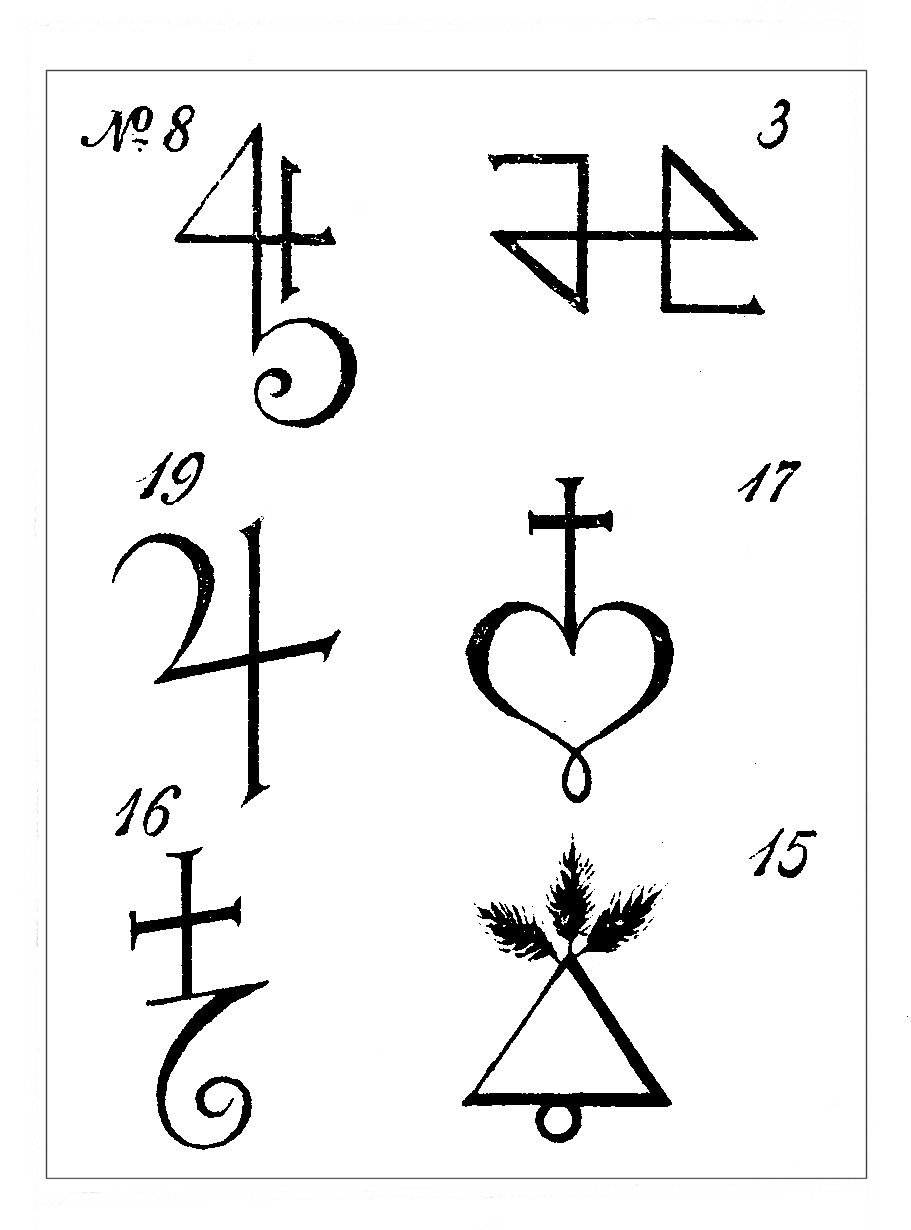 Alte Hausmarken in Gutenberg (Oberostendorf) im Allgäu